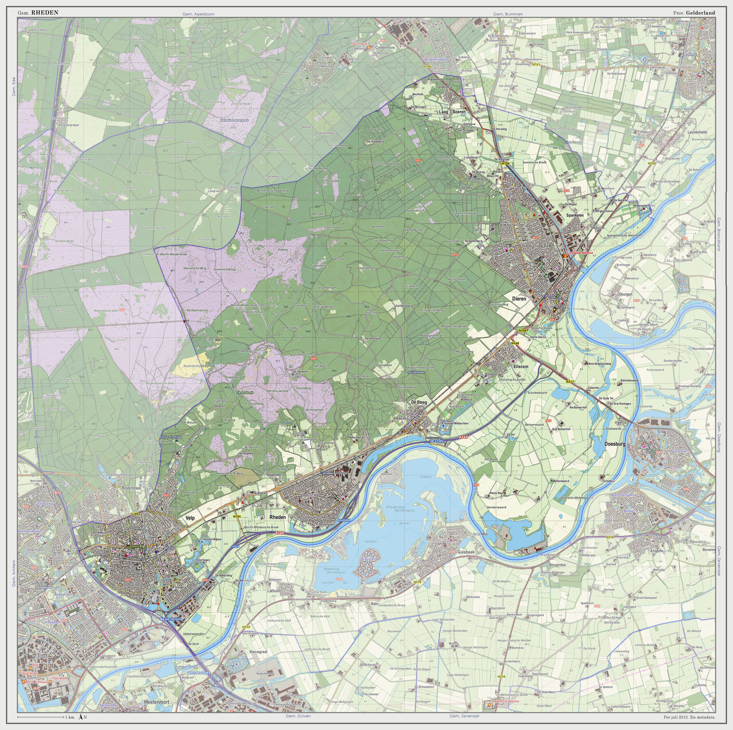 Topografische kaart van gemeente Rheden (2013). Samengesteld door Jan-Willem van Aalst op basis van de GML open geodata van de BRT/Top10NL (basisregistratie Topografie, Kadaster 2011), vrijgegeven door Kadaster onder de Creative Commons BY licentie. Additionele gegevens uit BAG (8 juli 2013), uit de Open Street Map (9 juli 2013) en uit de Risicokaart. Peildatum kaartbeeld: 9 juli 2013. Zie ook Gemeentenatlas.nl Samenstelling en kleurenschema: Jan-Willem van Aalst, met QuantumGIS en Photoshop. Zie ook de Legenda.